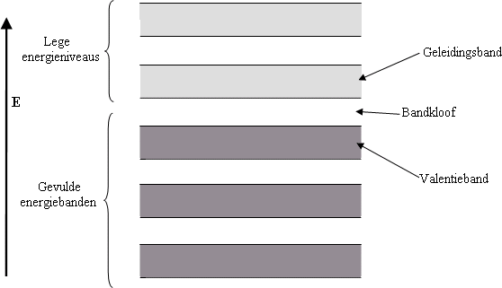 want overgenomen van engelse wikipedia ( waar ook PD vermeld staat